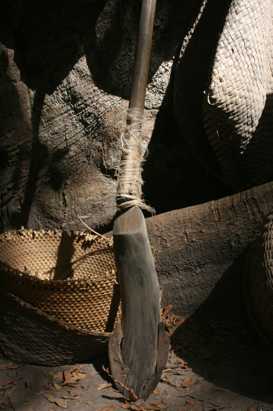 Le kadiandou, outil traditionnel des Diolas utilisé pour la culture du riz en Casamance. Photo prise au musée en plein air consacré à la culture des Diolas à Boucotte (Casamance, Sénégal)